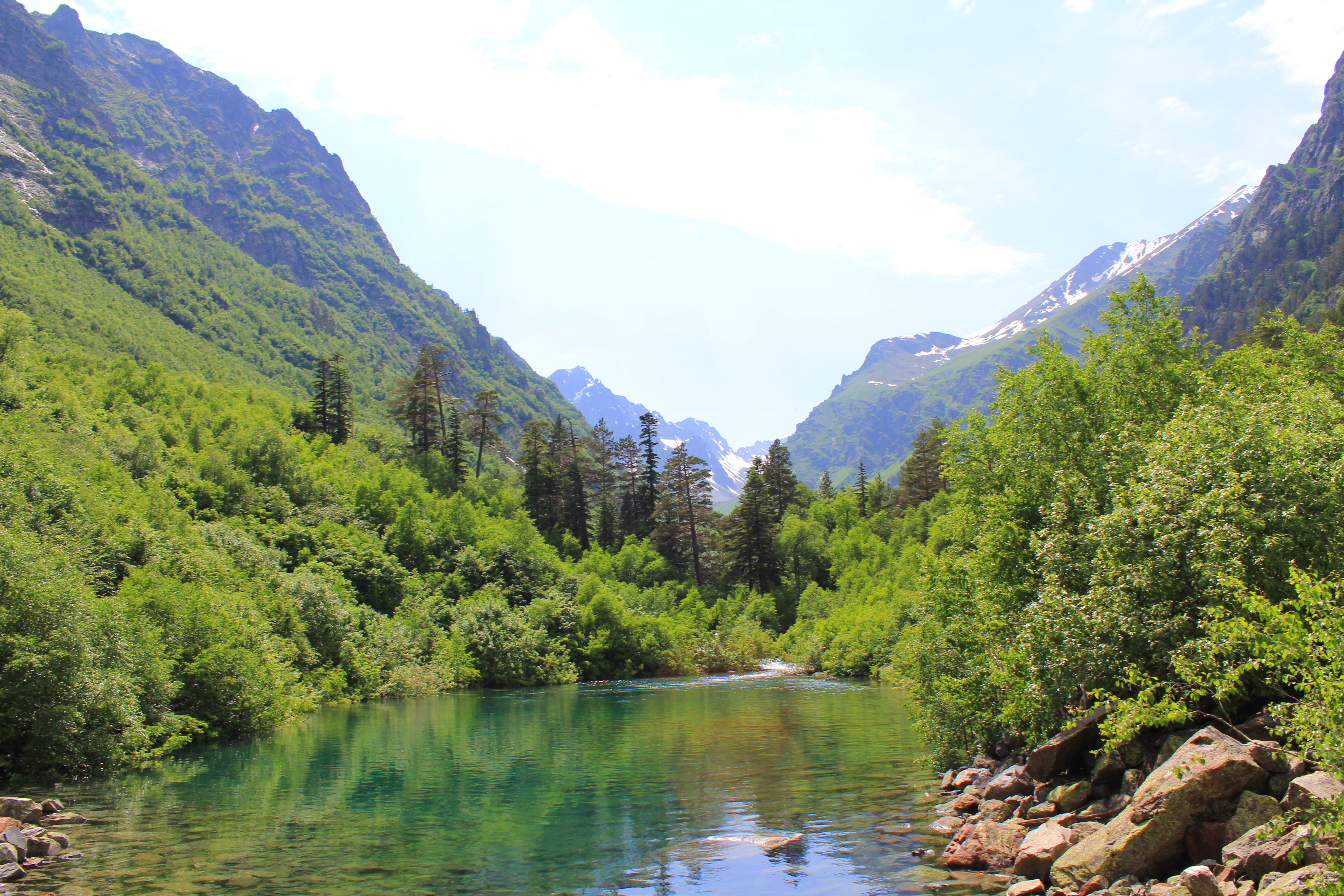 Тебердинский заповедник: Расположен заповедник на юге Карачаево-Черкесской Республики (КЧР), в пределах Главного Кавказского хребта, Зеленчукский район, Карачаево-Черкесия This image is related to the protected area of Russia number 0900019